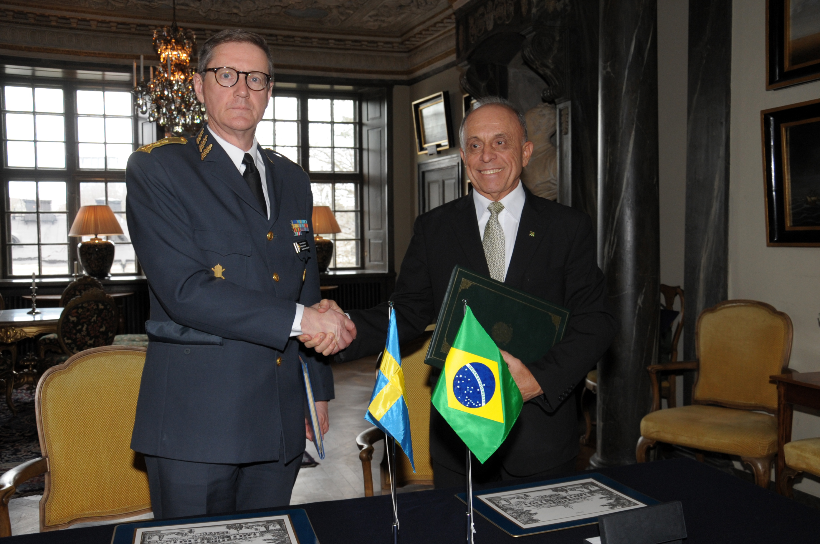 03/04/2014, Estocolmo - Suécia Fotos: Jorge Cardoso